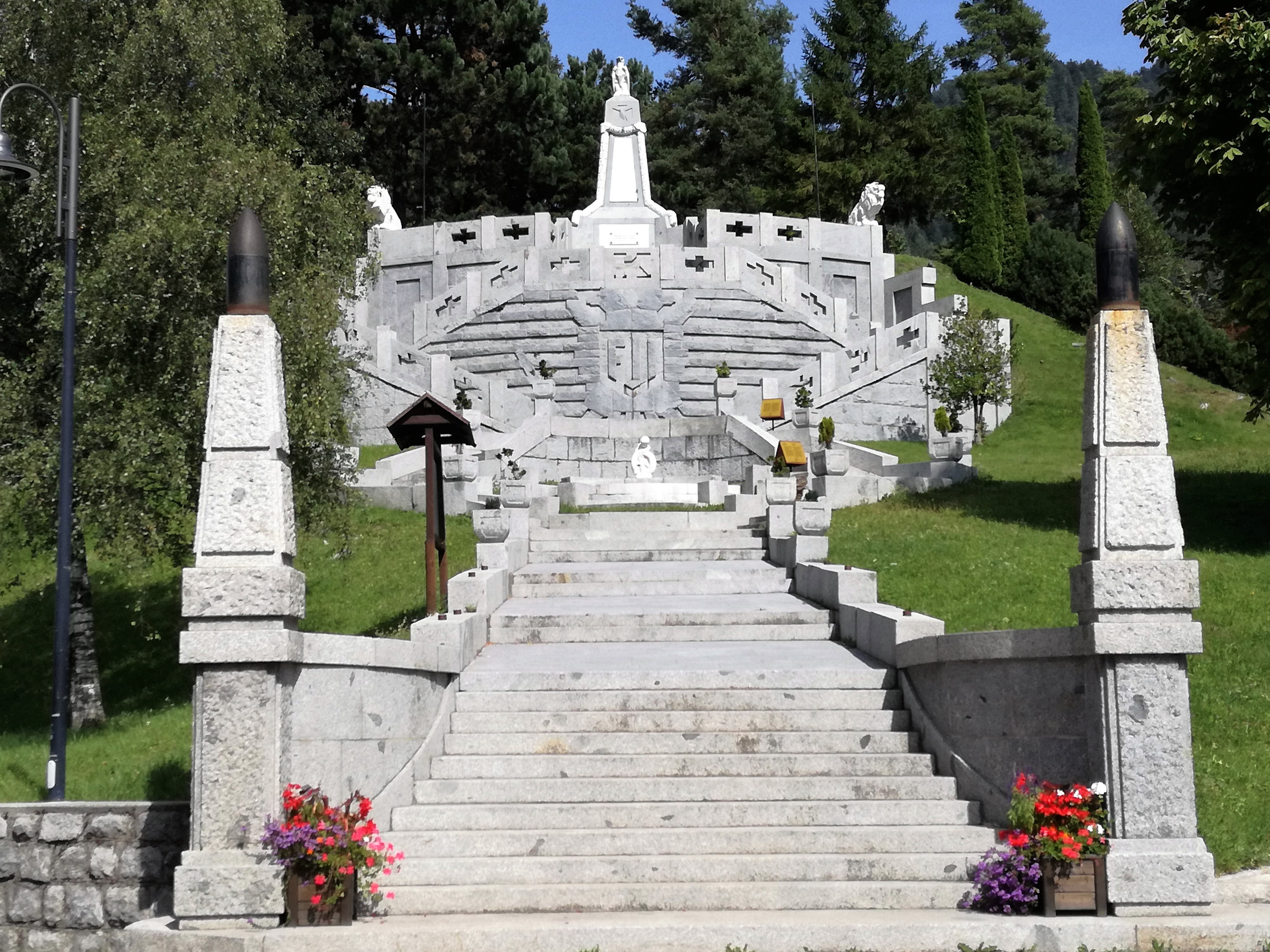 österreichisch-ungarischer Soldatenfriedhof Bondo (Trentino)